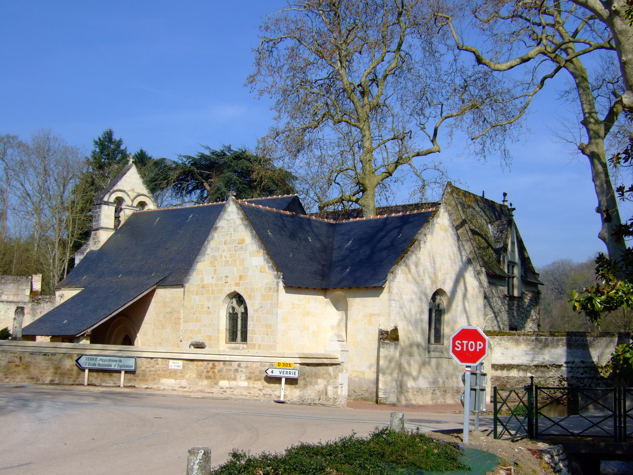 L'église de Marson à Rou-Marson (Maine-et-Loire, France).